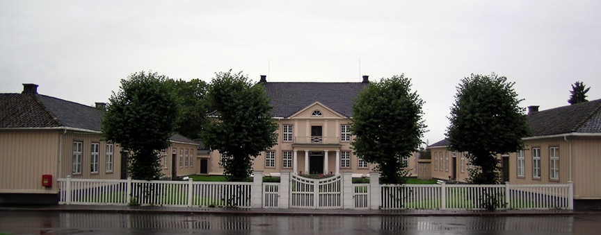 Brekke gård, Skien, Norway.